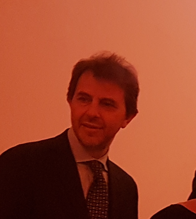 Francesco Giorgino, Lorenzo Marone, Cinzia Tani, al Premio Candelaio presso il Seminario vescovile di Nola, 4 maggio 2018